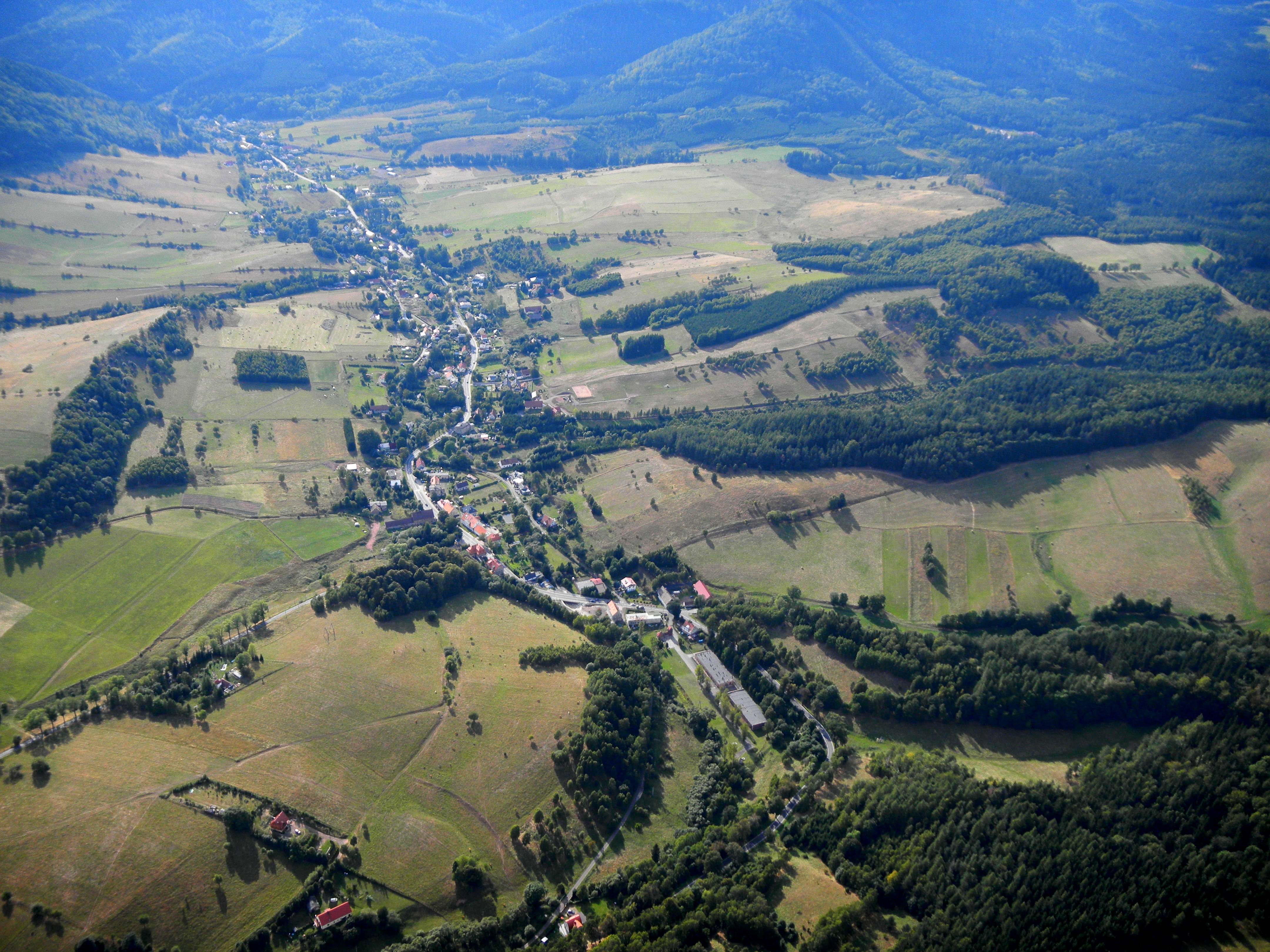 Unisław Śląski widziany z paralotni